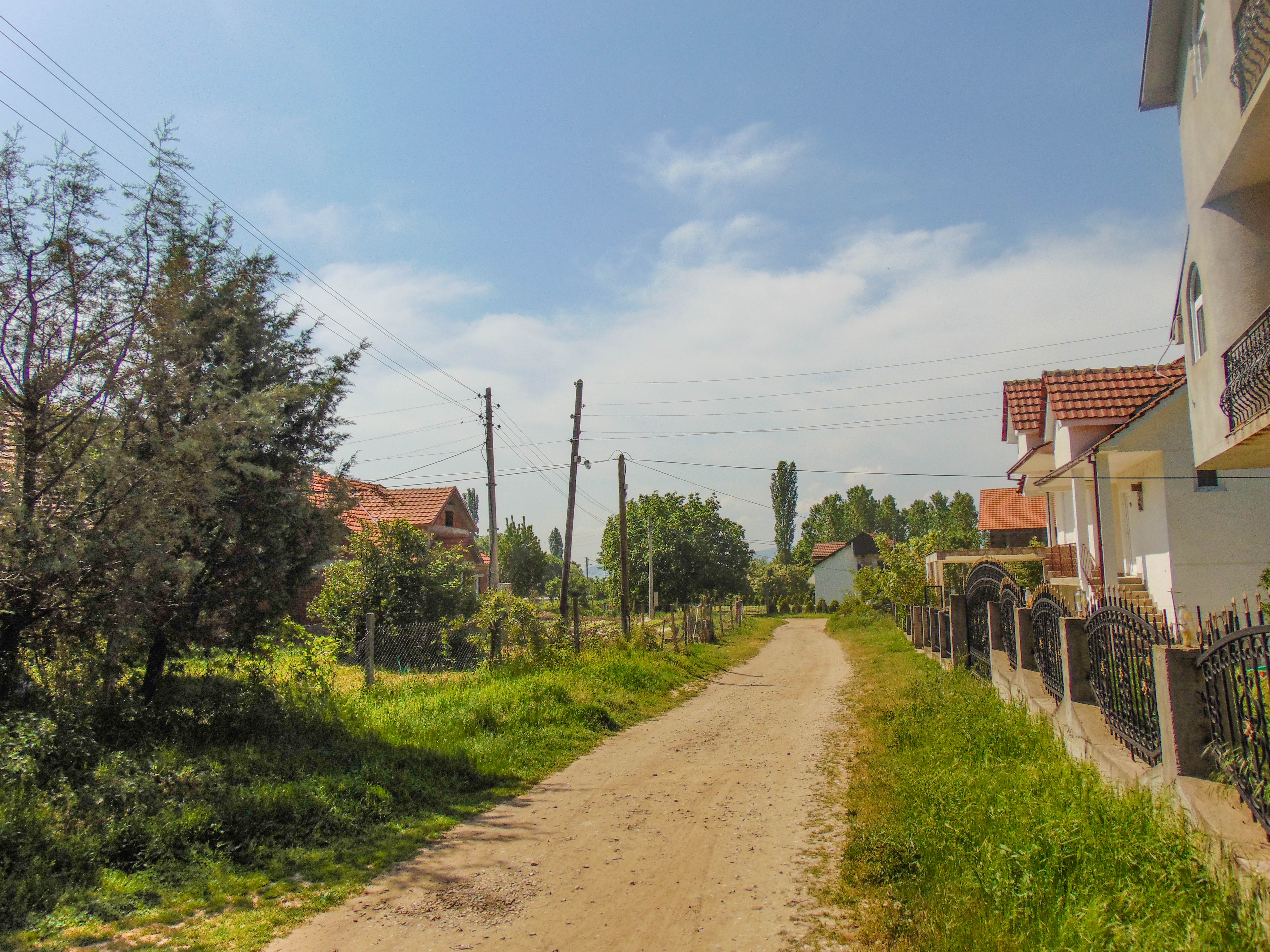 Подареш - Радовиш